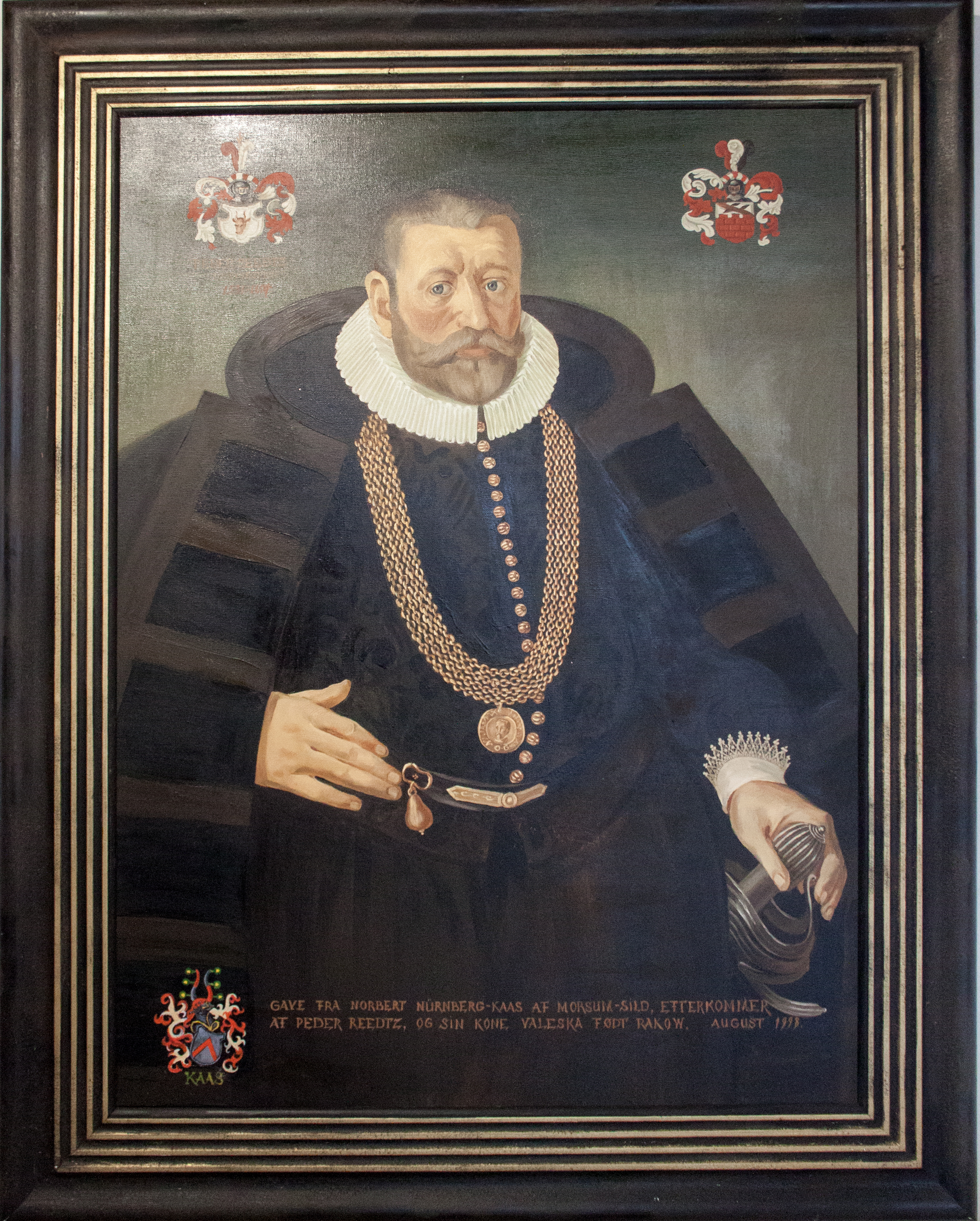 Portrait of Peder Reedtz in Skaelskor Bymuseumlabel QS:Len,"Portrait of Peder Reedtz in Skaelskor Bymuseum" label QS:Lhu,"Peder Reedtz portréja a skaelskori városi múzeumban"